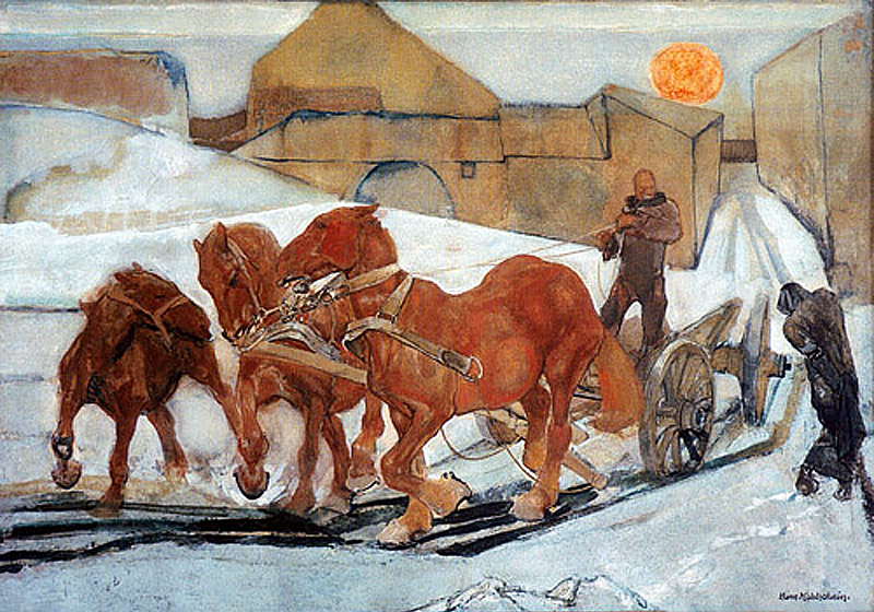 Troika